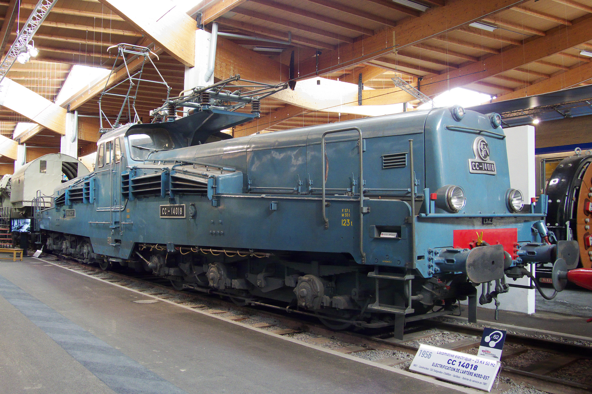 CC 14018 Cite du train